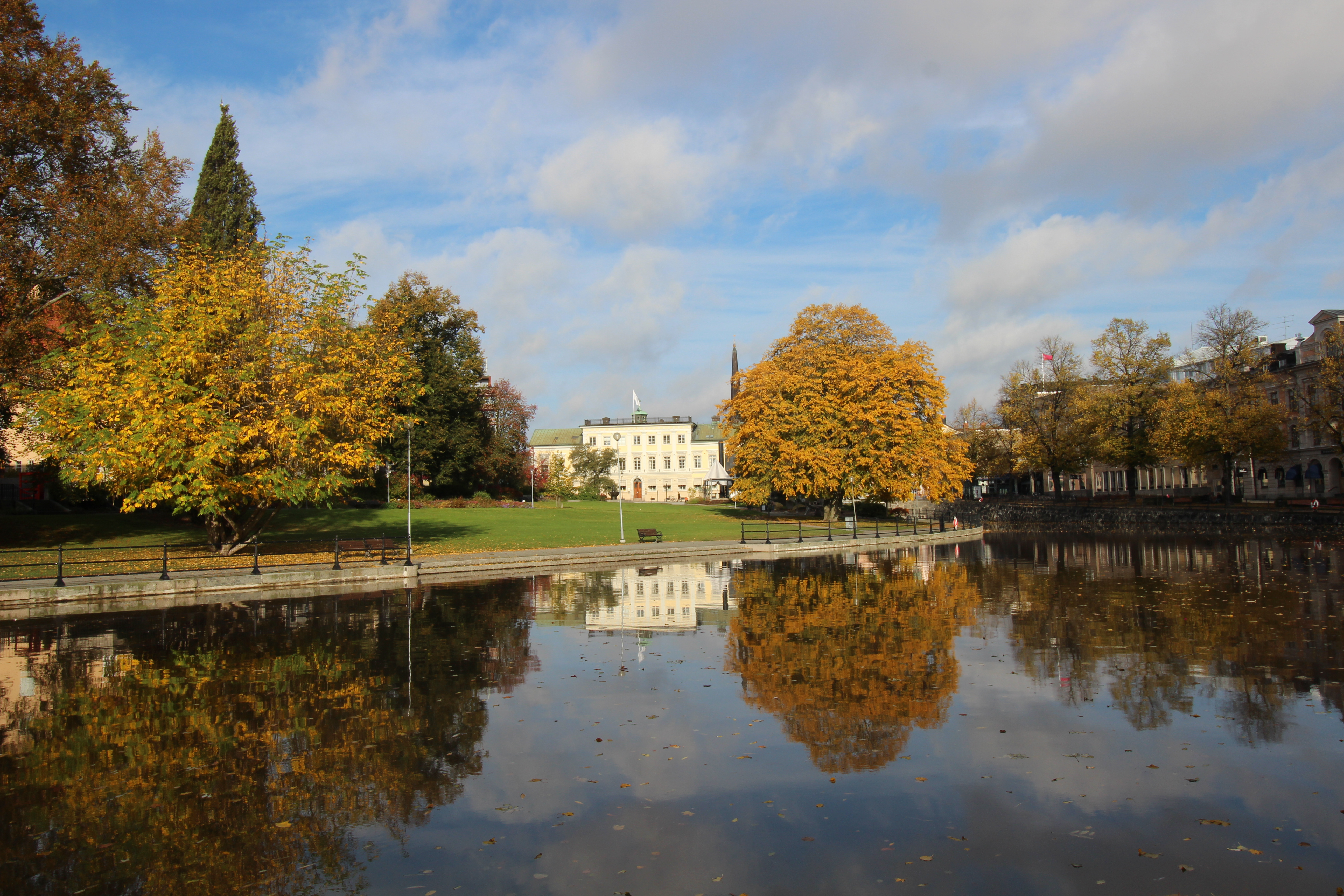 Sundinska huset i Västerås, Svartån i förgrunden